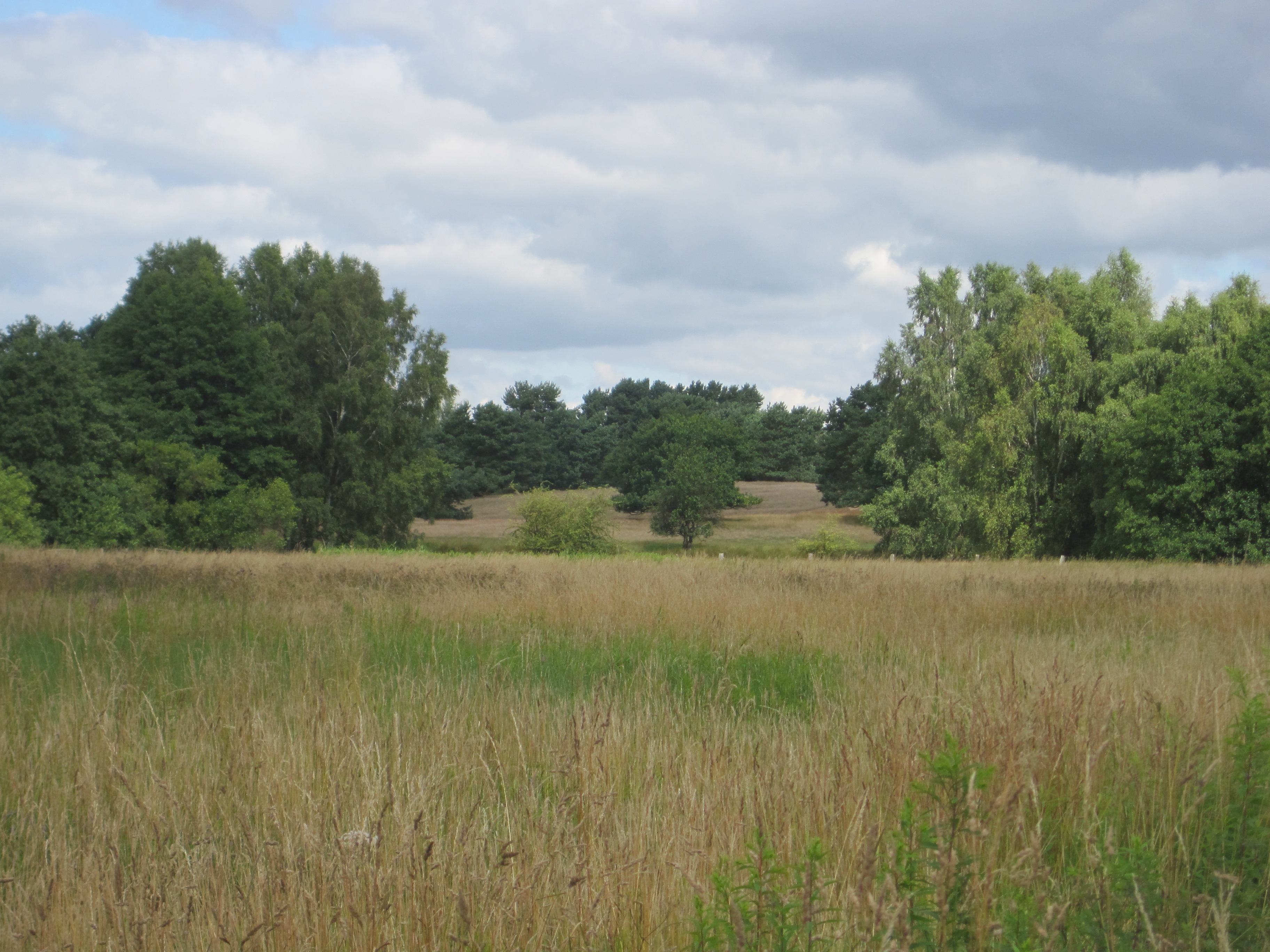 Herrnburger Binnendüne südlich des Lüdersdorfer Bachs